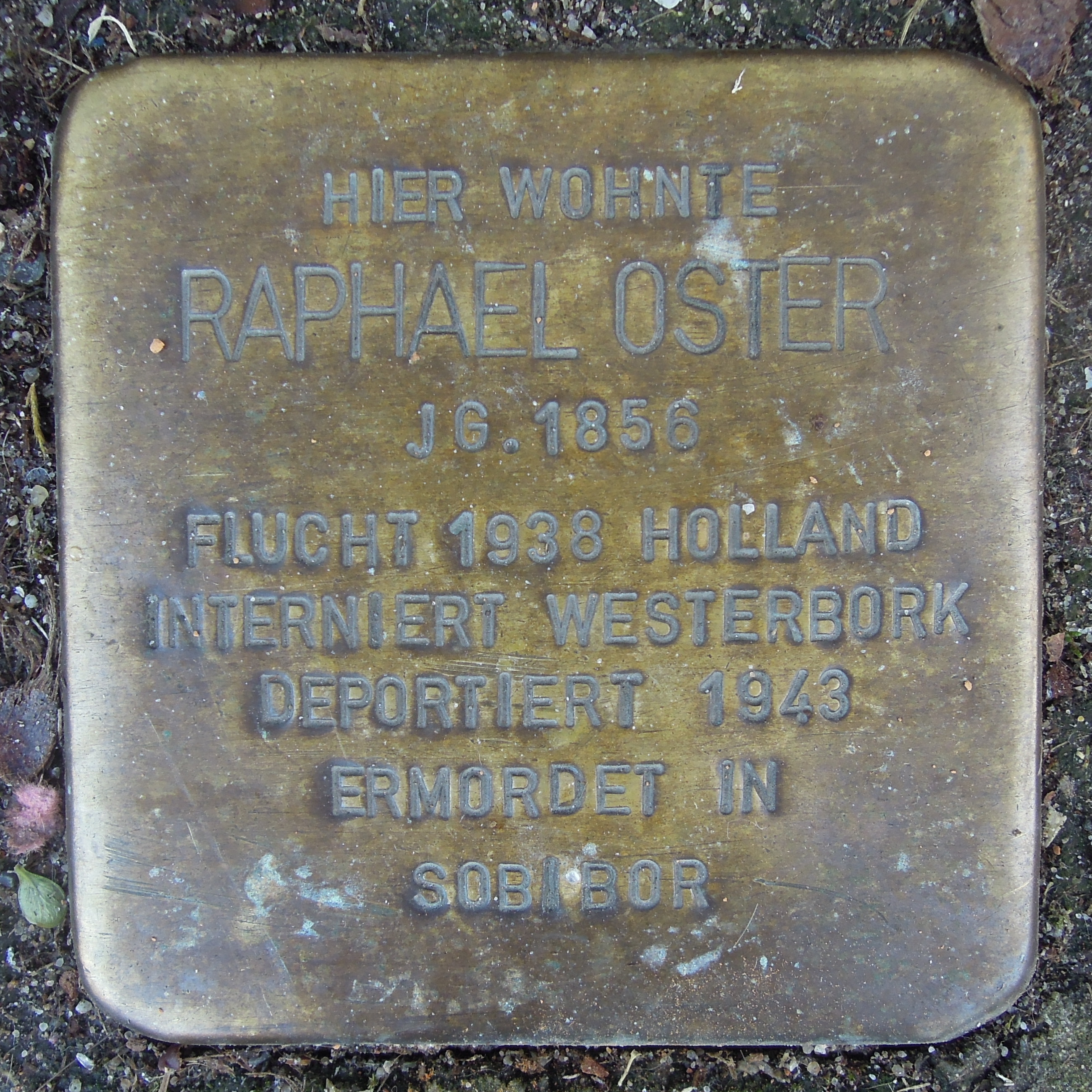 Stolperstein Alpen Burgstraße 34 Raphael Oster